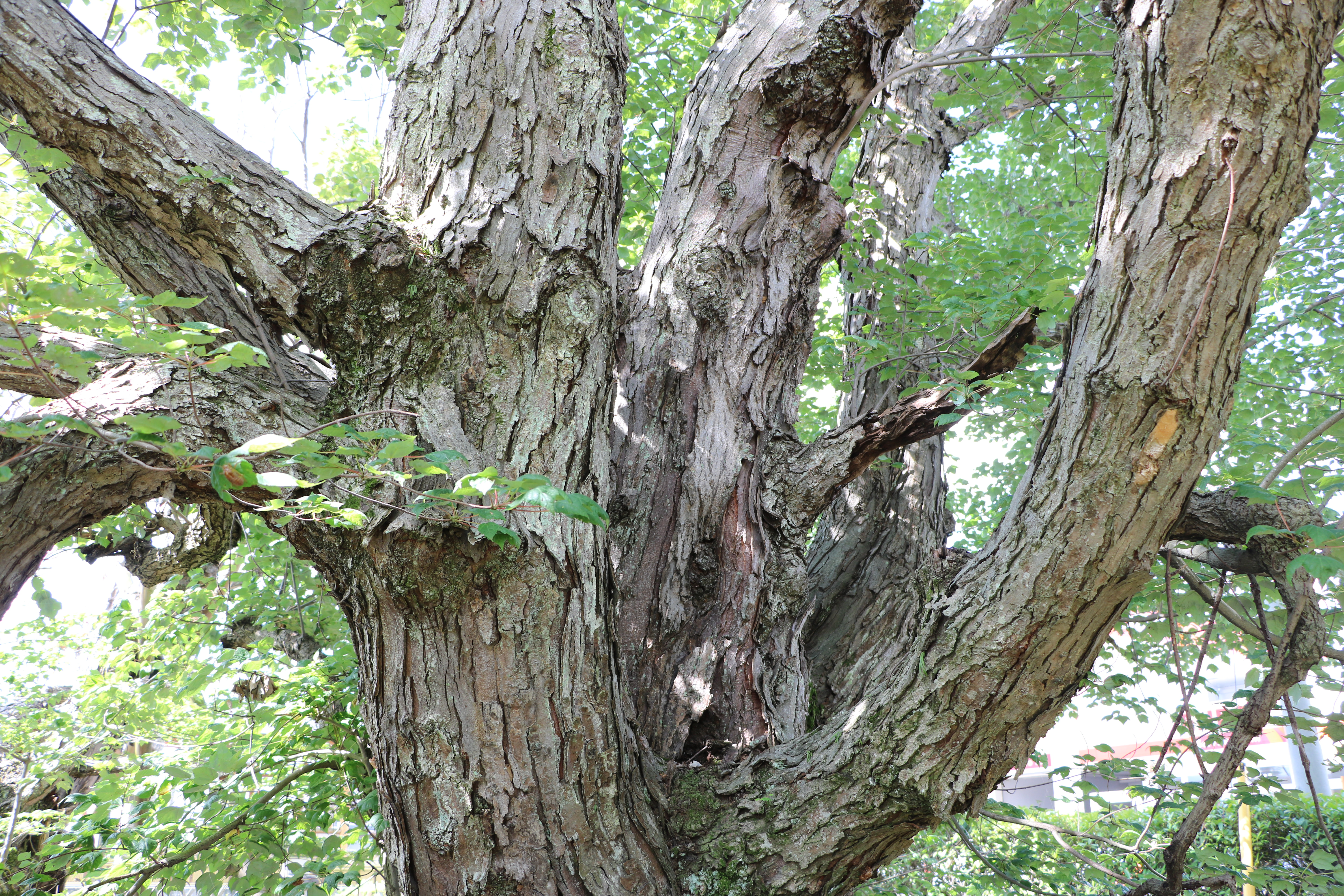 北花沢のハナノキ（国指定天然記念物、滋賀県東近江市）の後継樹